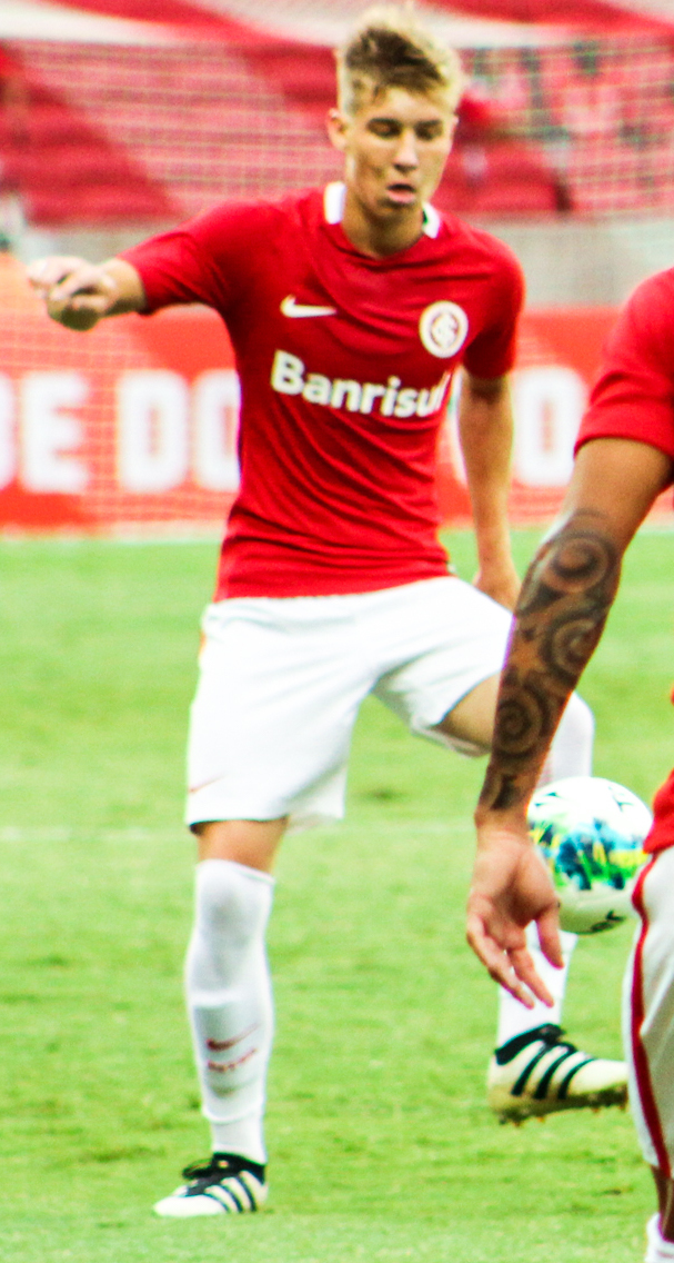 Charles em ação pelo Inter